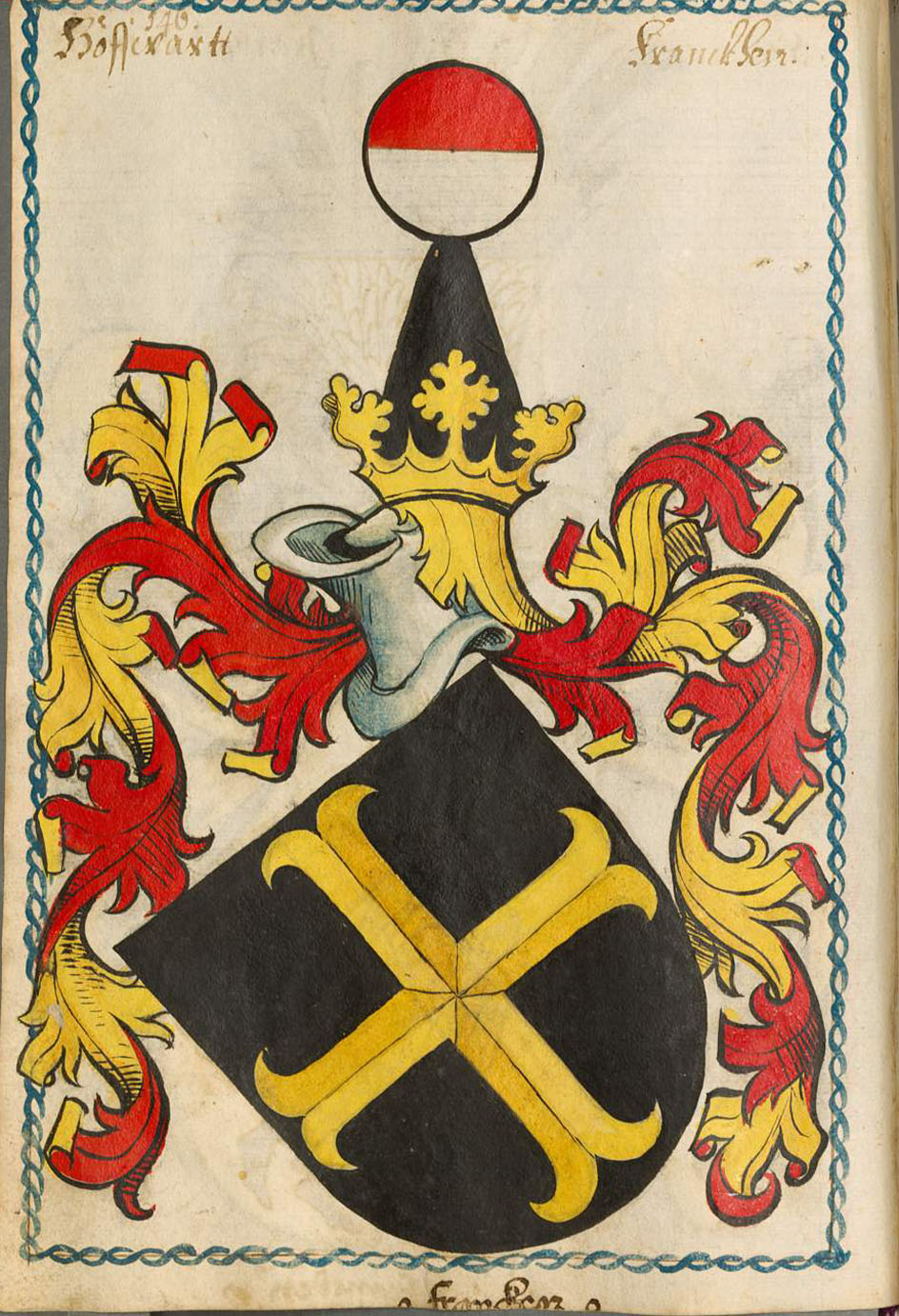 Scheibler'sches Wappenbuch , älterer Teil Wappen der Familie Hofwart.